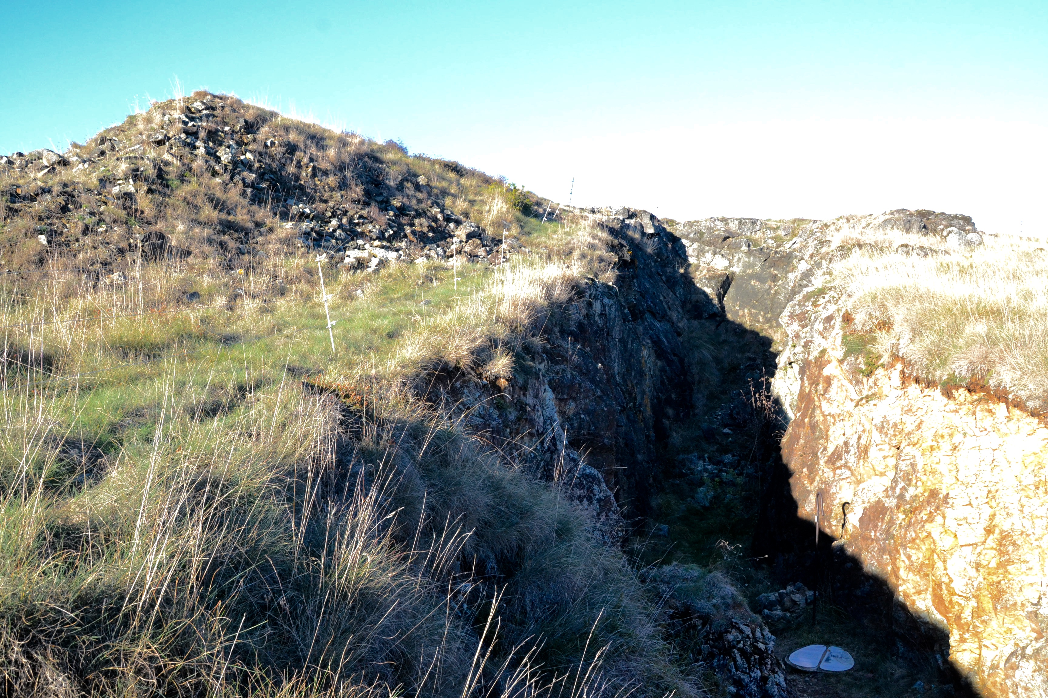 Ancienne carrière d'amiante dans la lande de Saint-Laurent (La Roche-l'Abeille, Haute-Vienne, France)